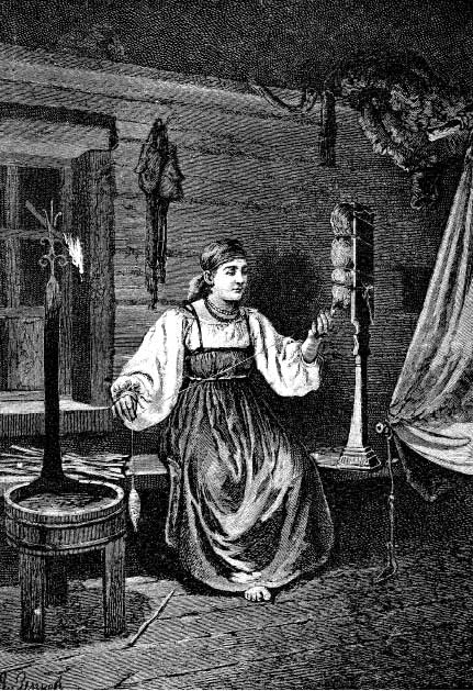 Прядение при лучине